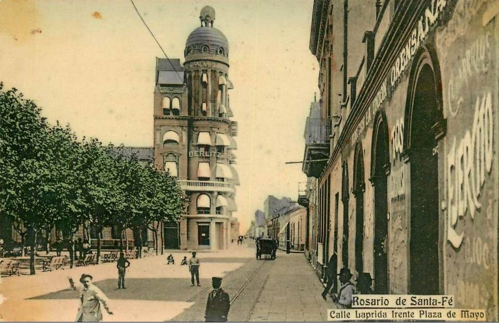 Vista del edificio La Bola de Nieve y parte de la Plaza de Mayo en Rosario. Aproximadamente 1910.